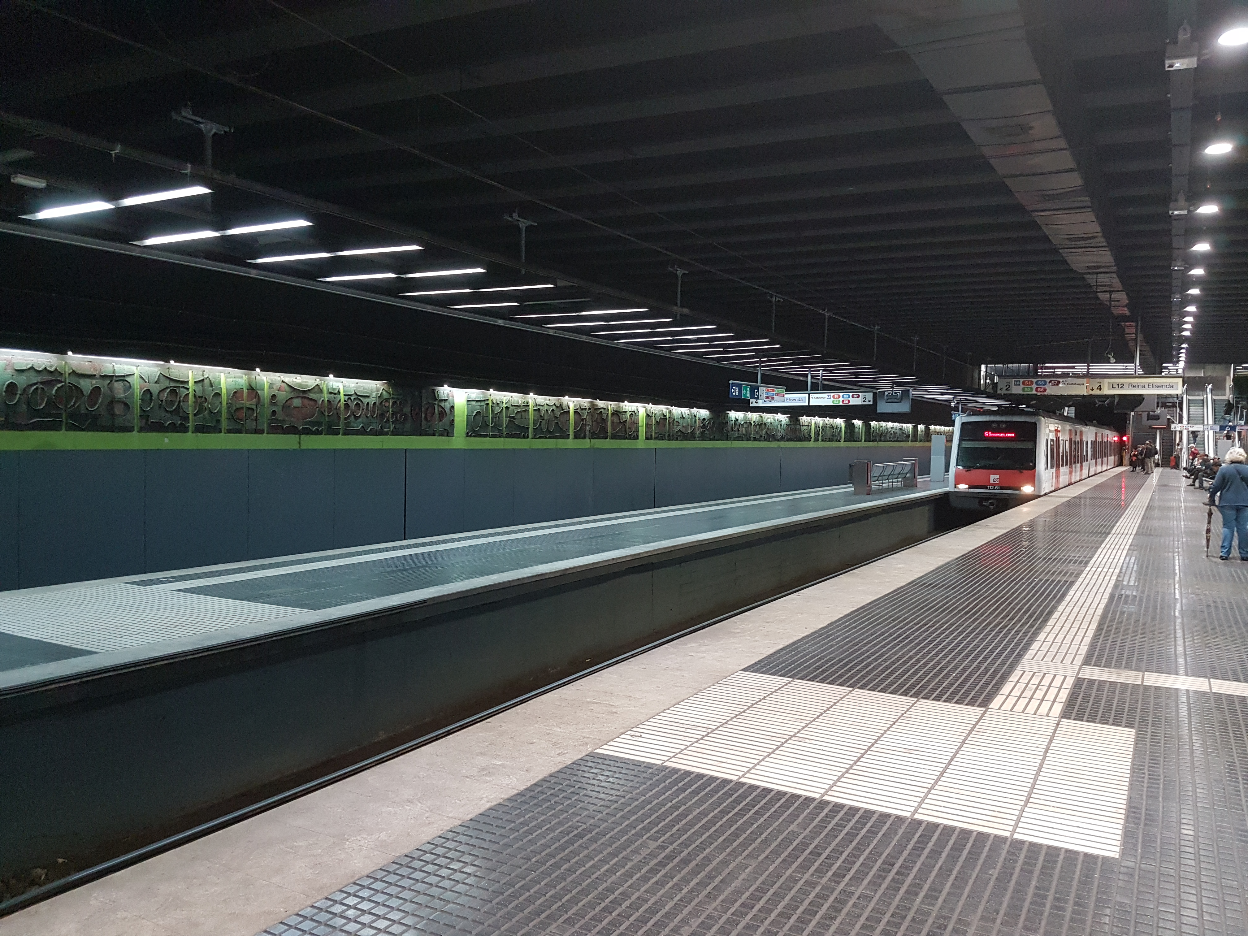 Tren de la sèrie 112 a la via 2 amb servei S1 Barcelona entra a l'estació